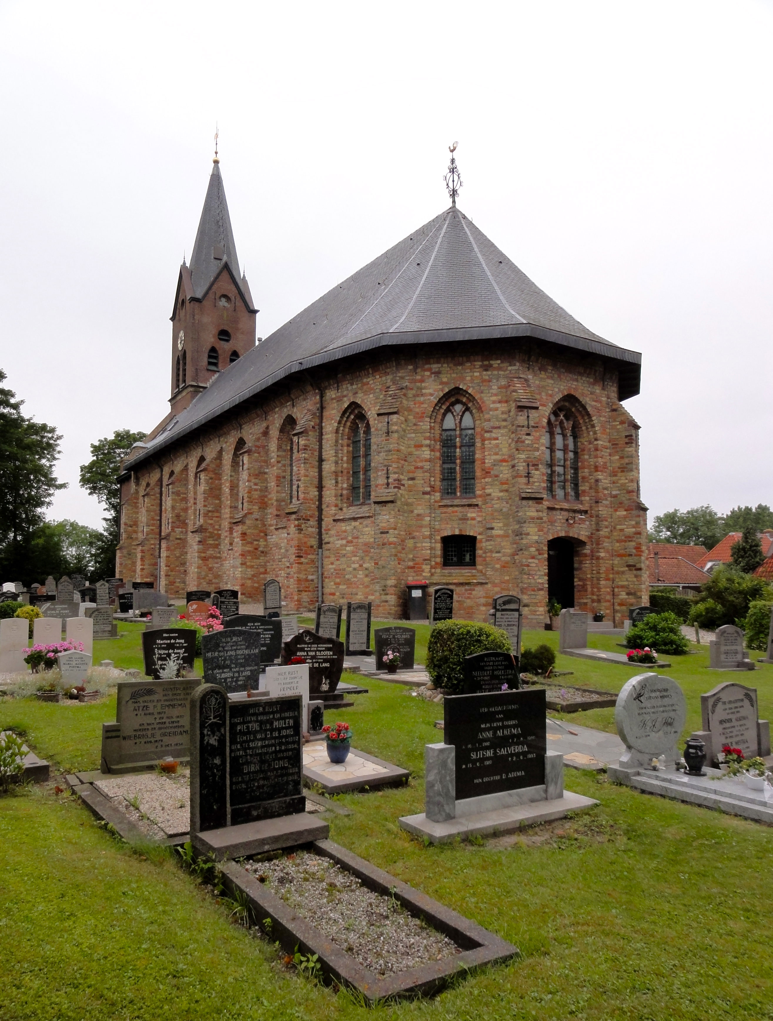 Sint-Andreaskerk in Wijnaldum